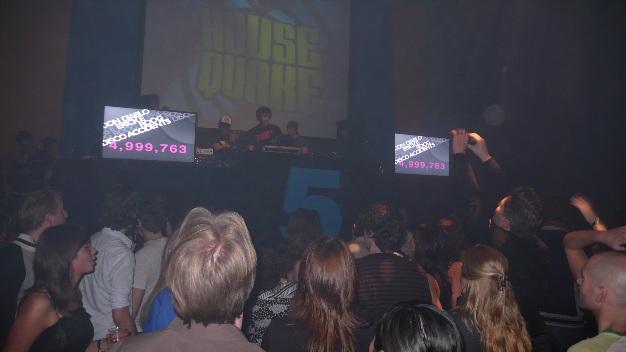 DJ